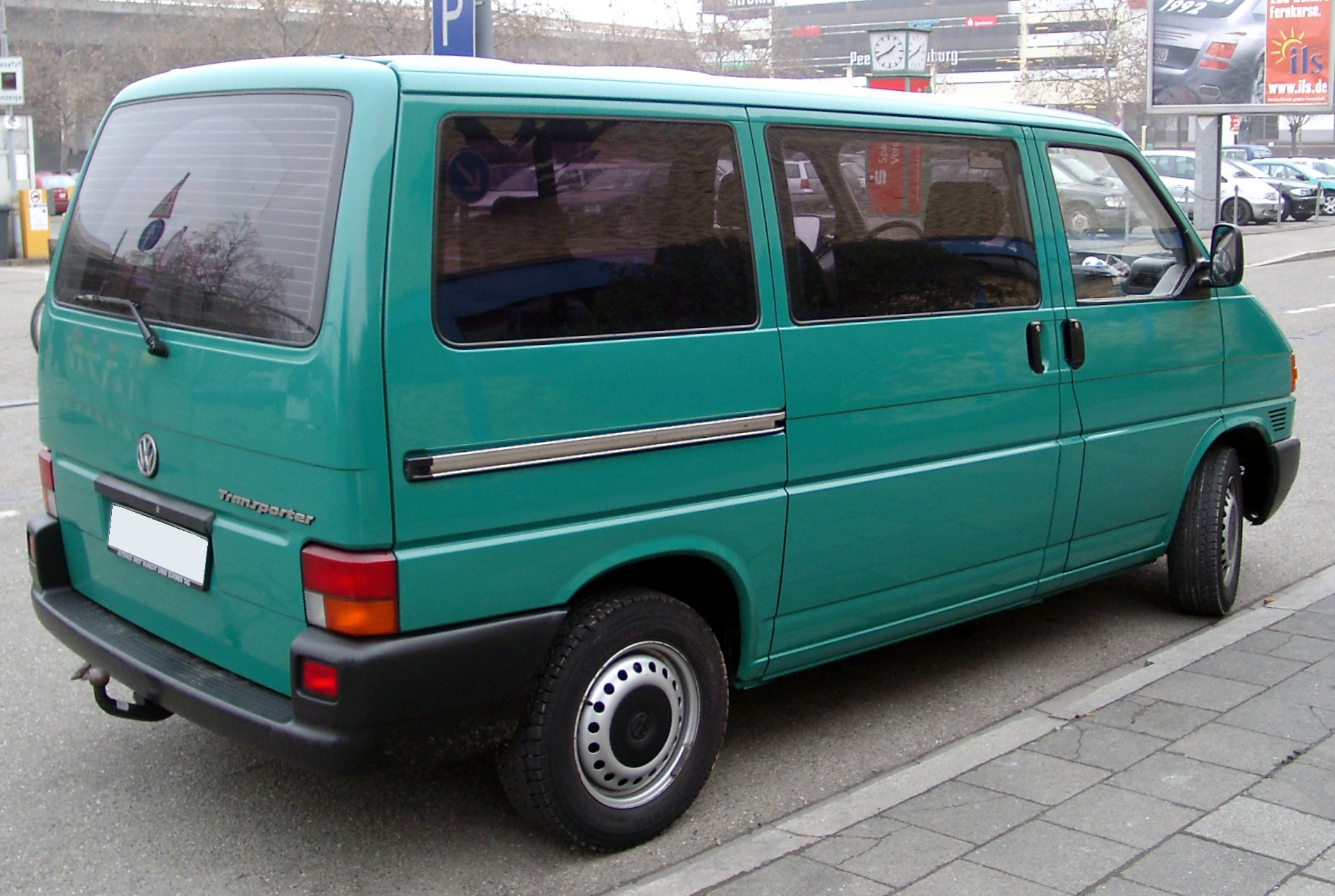 VW Bus (T4)